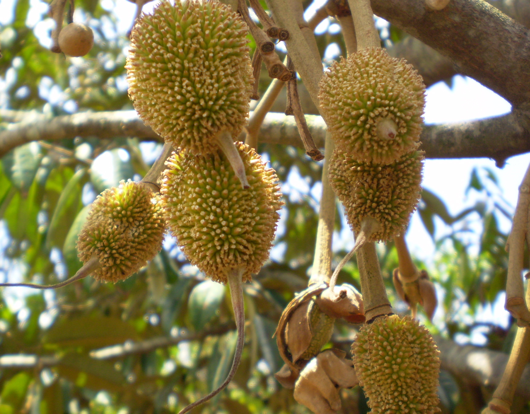 Trái sầu riêng non